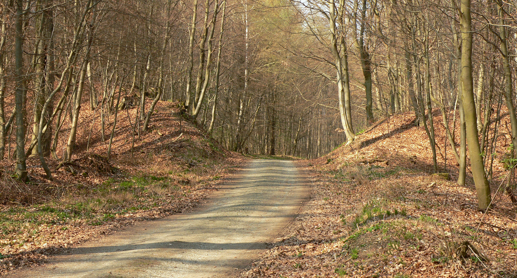 Reitlingsbefestigungen mit Wall der Krimmelburg, Walldurchbruch durch neuzeitlichen Forstweg